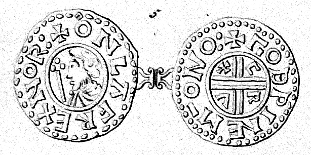 Pfennig-Münze Olav Tryggvason (995-1000 König von Norwegen). Text: Adv: + ONLAF REX NOR(vegiae/mannorum). Rev: + GOÐPINE M(onetarius) O(n) NO(rvegiae/rmannorum).